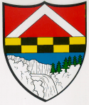 Wappen von Les Brenets Kanton Neuneburg Schweiz